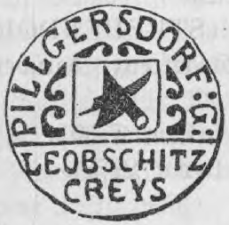 Altes Siegel bzw. Stempel der Gemeinde Pilgersdorf im Kreis Leobschütz.